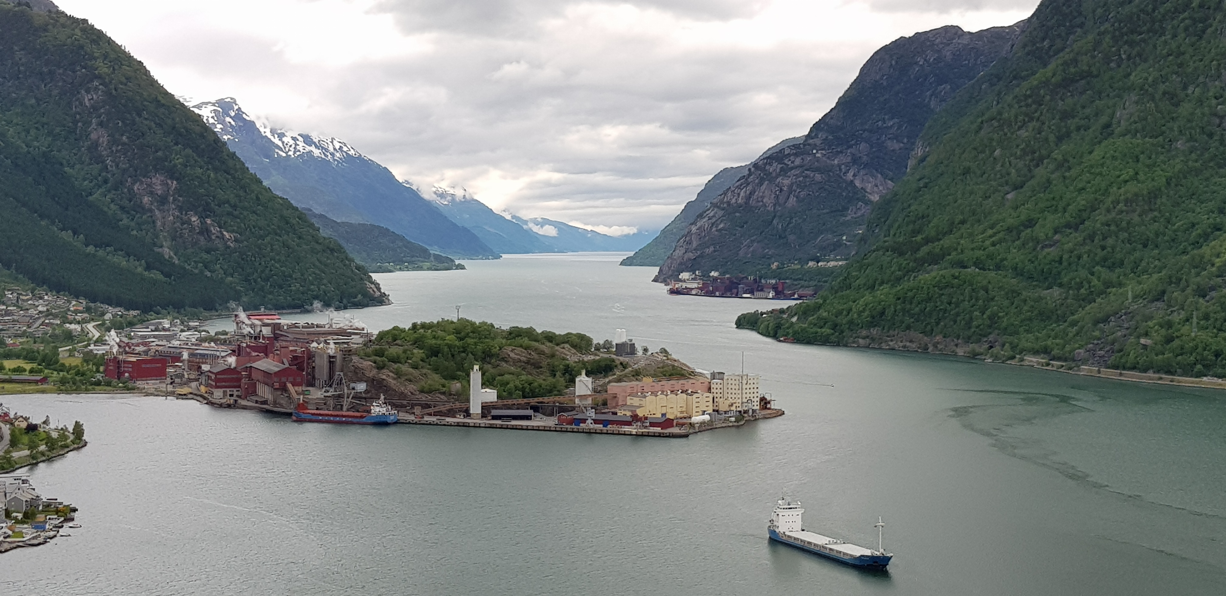 Sinkverket til Boliden Odda AS ligger på Eitrheimsneset. Sinkmalm og ferdig sinkmetall fraktes med skips fra fabrikken.